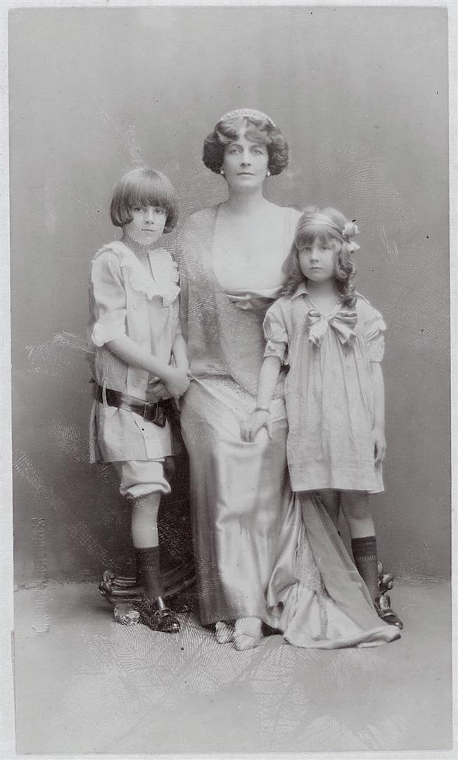 Louise Morris Gebhard, épouse d'Henry Clews, vente aux enchères "Photographies par Otto Wegener (1849-1924)" à Hôtel de vente Drouot le 8 novembre 2018